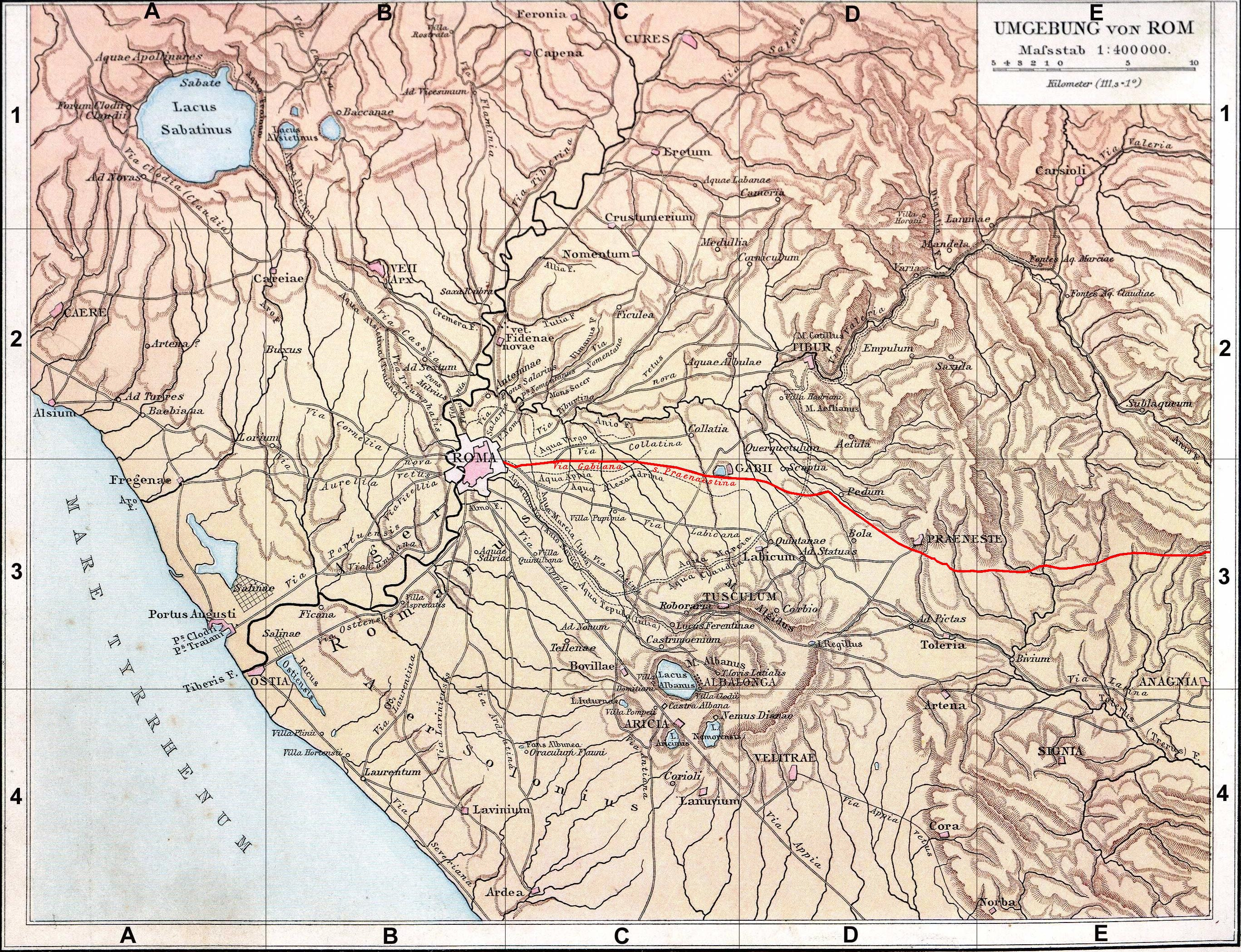 Fond de carte de 1886 (G. Droysens Allgemeiner Historischer Handatlas), libre de droit (Image:Rom_Umgebung.jpg), avec la voie Prénestine en rouge.